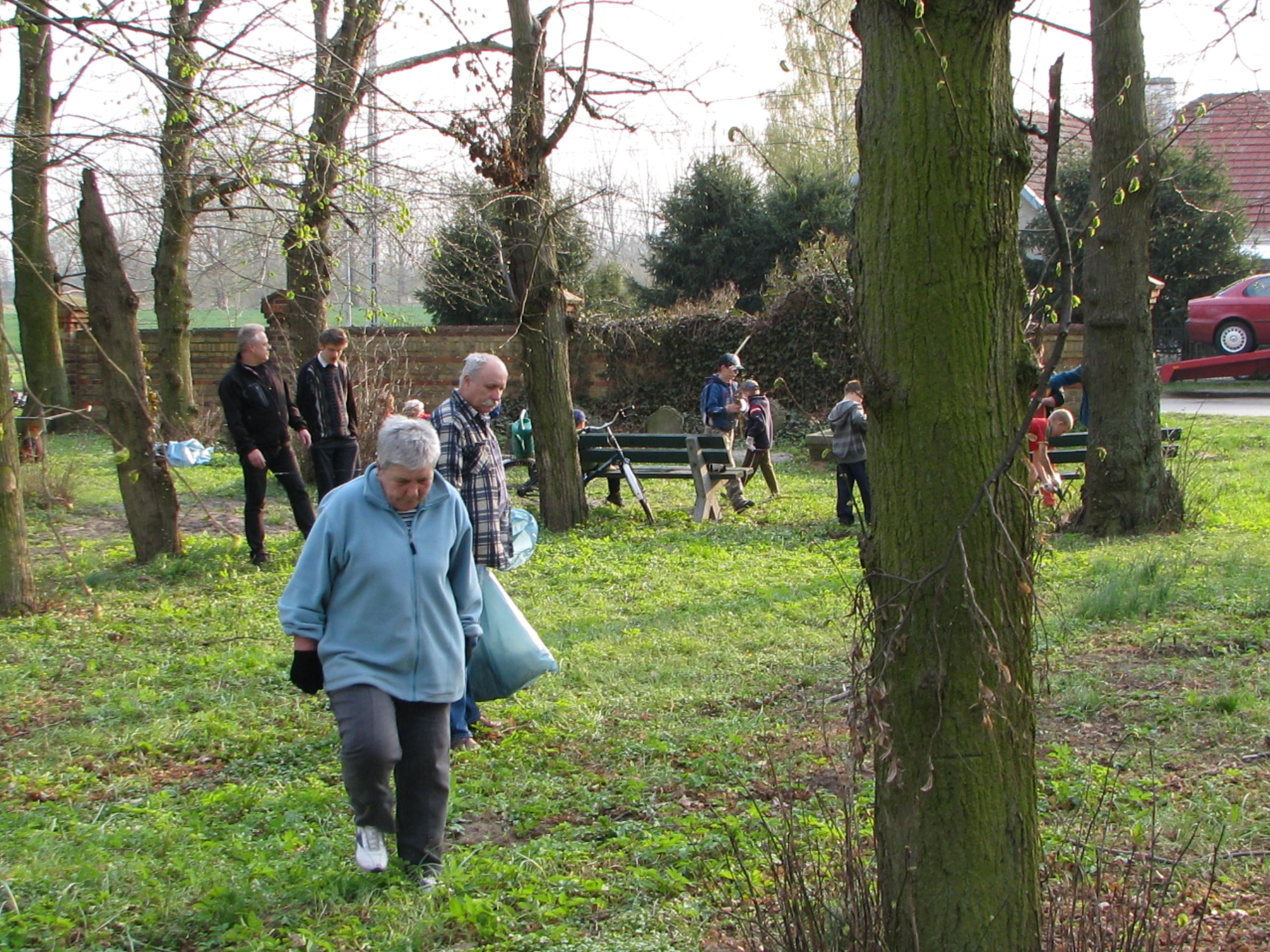 Wojcieszyce. Sprzątanie wsi.